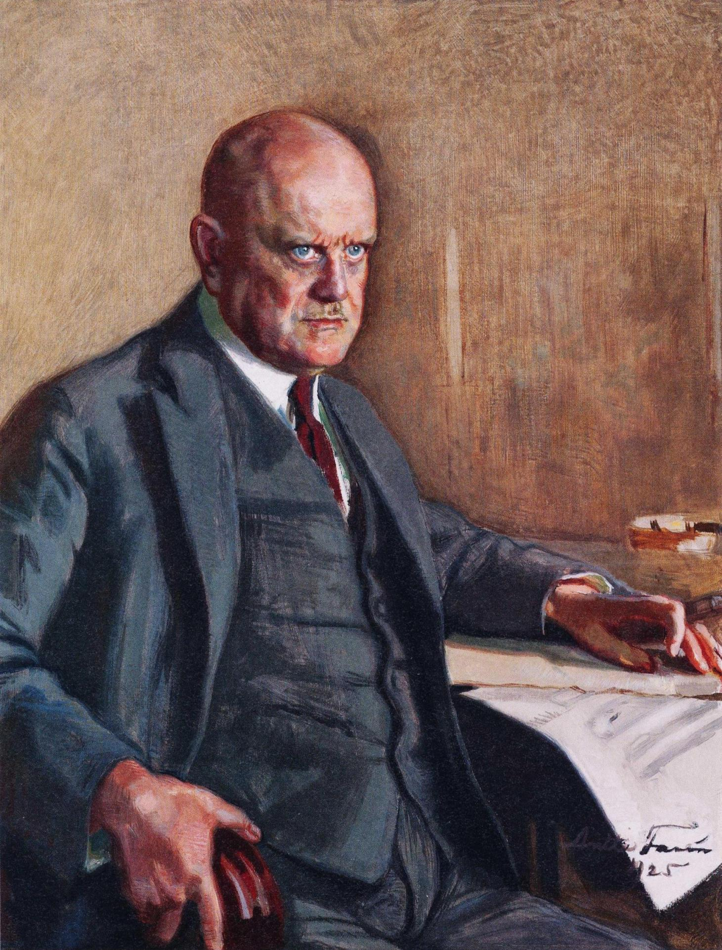 Antti Favénin maalaama muotokuva Jean Sibeliuksesta. Omistaja Helsingin kaupunginmuseo. Maalaus oli aiemmin sijoitettuna Helsingin Finlandia-taloon kaupunginorkesterin kapellimestarin työhuoneeseen.